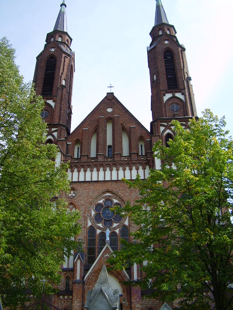 Sadowne - kościół pw. św. Jana Chrzciciela (zabytek nr rejestr. 949)